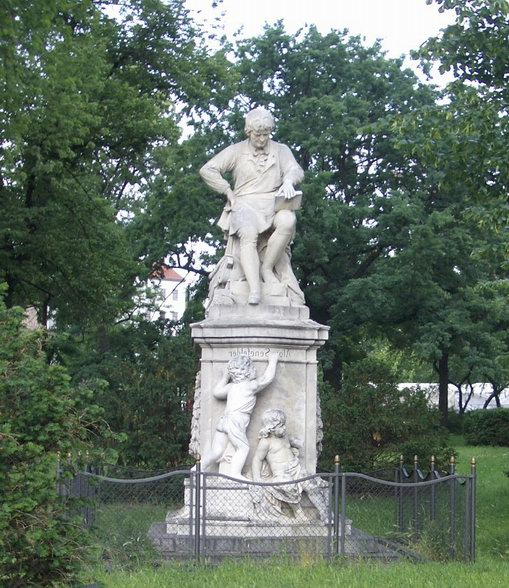 Beschreibung: Denkmal für Alois Senefelder, Senefelderplatz, Berlin-Prenzlauer Berg. Bildhauer: Rudolf Pohle Datum: Juli 2004 Fotograf oder Zeichner: Magadan, selbst fotografiert Lizenzstatus: GNU FDL